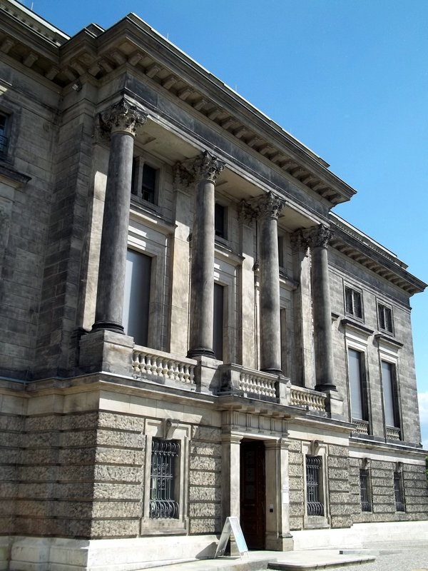 Das Goethe-Schiller-Archiv in Weimar, entstanden auf Initiative der Großherzogin Sophie - linksseitige Vorder-Ansicht